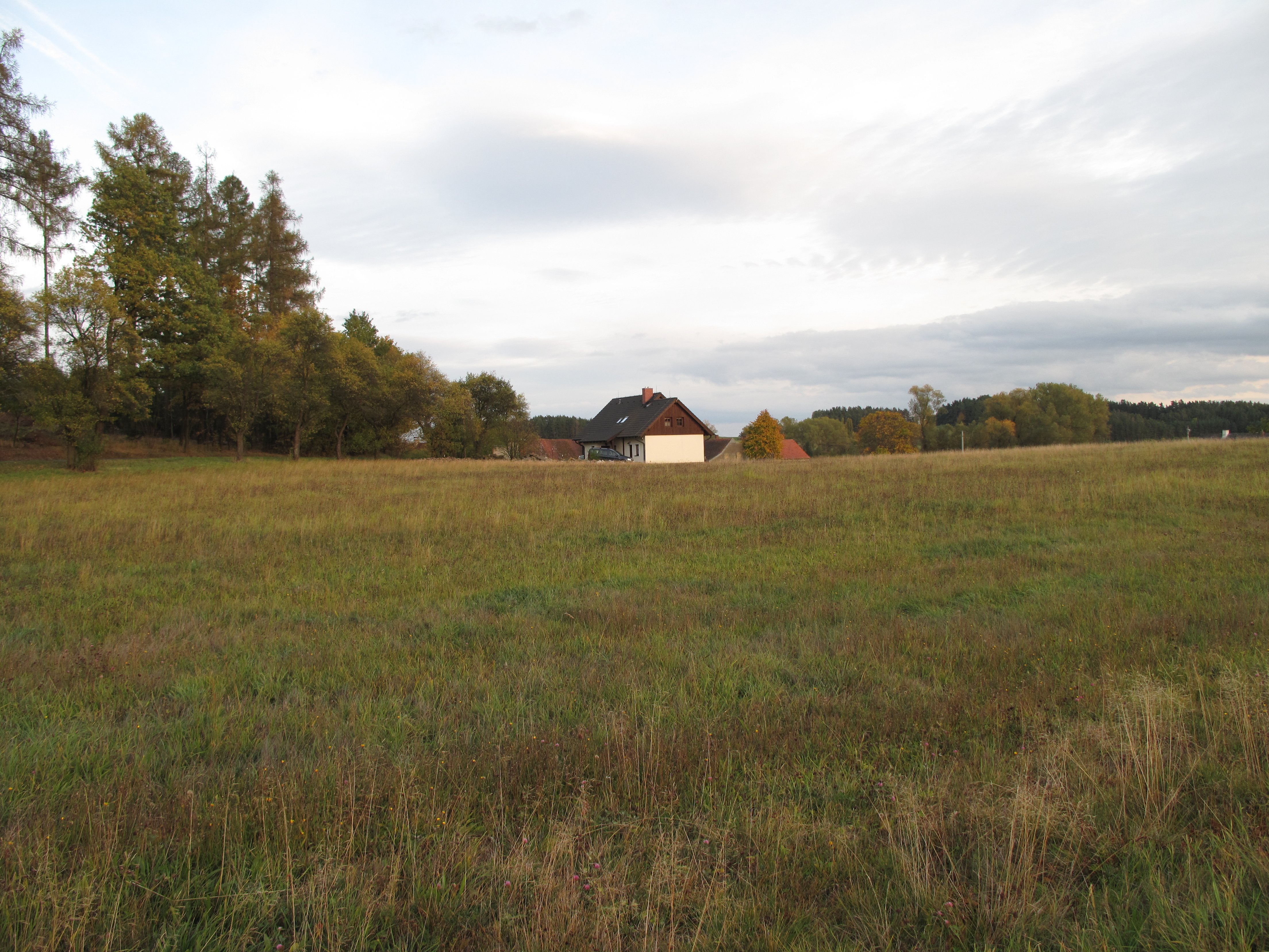 Karlovce. Okres Klatovy, Česká republika.